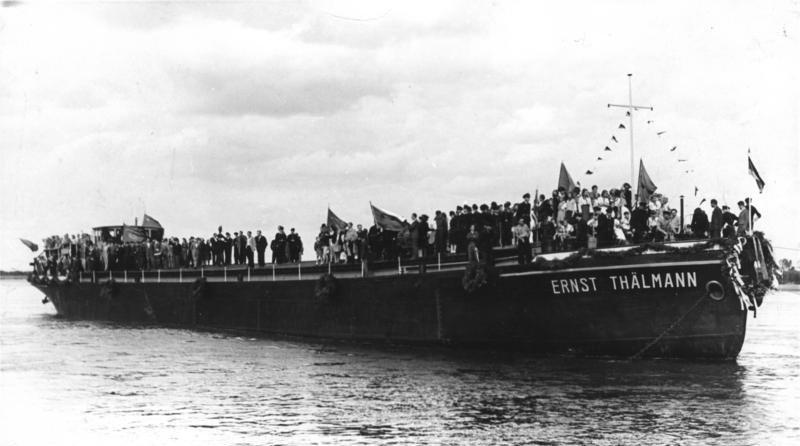 Tangermünde, Stapellauf Frachtschiff "Ernst Thälmann" Aufn.:Illus/Merker Stapellauf des Motor-Schnellfrachtschiffes "Ernst Thälmann" auf der Schiffswerft Tangermünde. Das grösste Motor-Schnellfrachtschiff der Elbe in der Ostzone, welches im Hennecke-Tempo von der volkseigenen Tangermünder Schiffswerft hergestellt wurde, lief am 18.8.49 - dem 5-jährigen Todestag Ernst Thälmann - vom Stapel und wurde auf seinen Namen getauft. Der neue Schnellfrachter hat eine Länge von 67 m und ein Ladegewicht von 820 to. U.B.z.: FDJ und Junge Pioniere waren zu dem Festakt erschienen. 3775-49